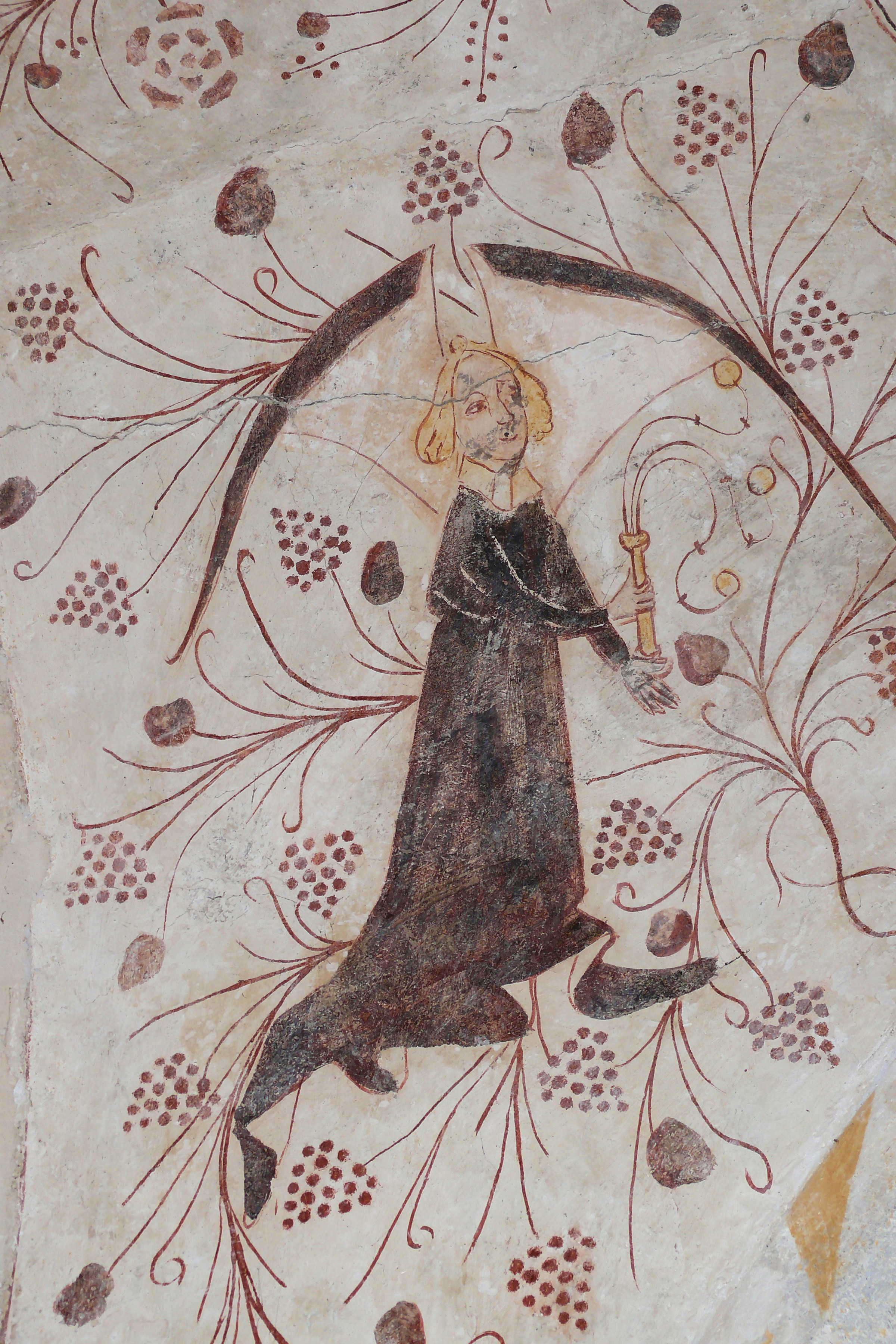 Fresko in der St.Bartholomäus-Kapelle bei St.Vith